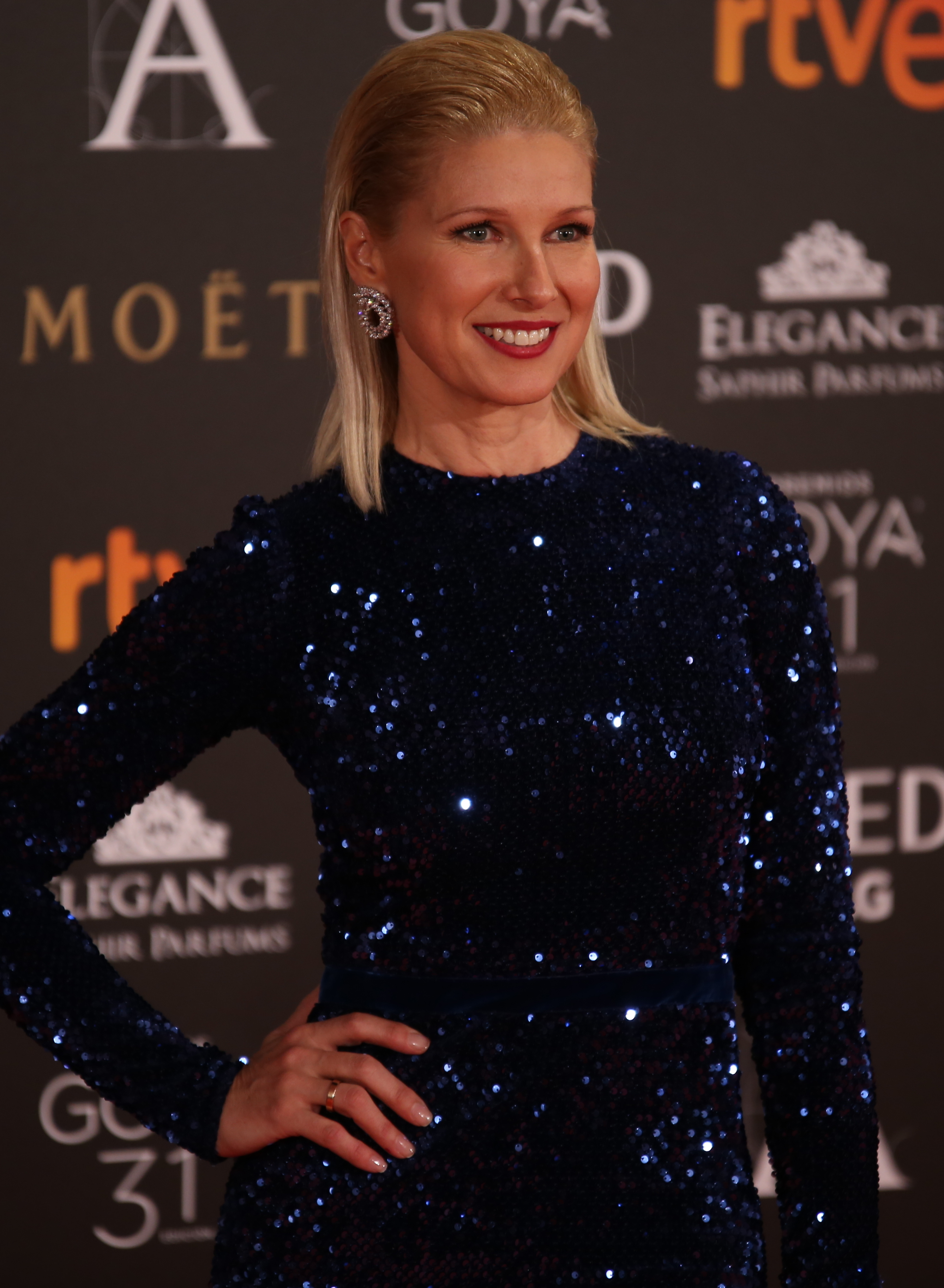 Premios Goya 2017